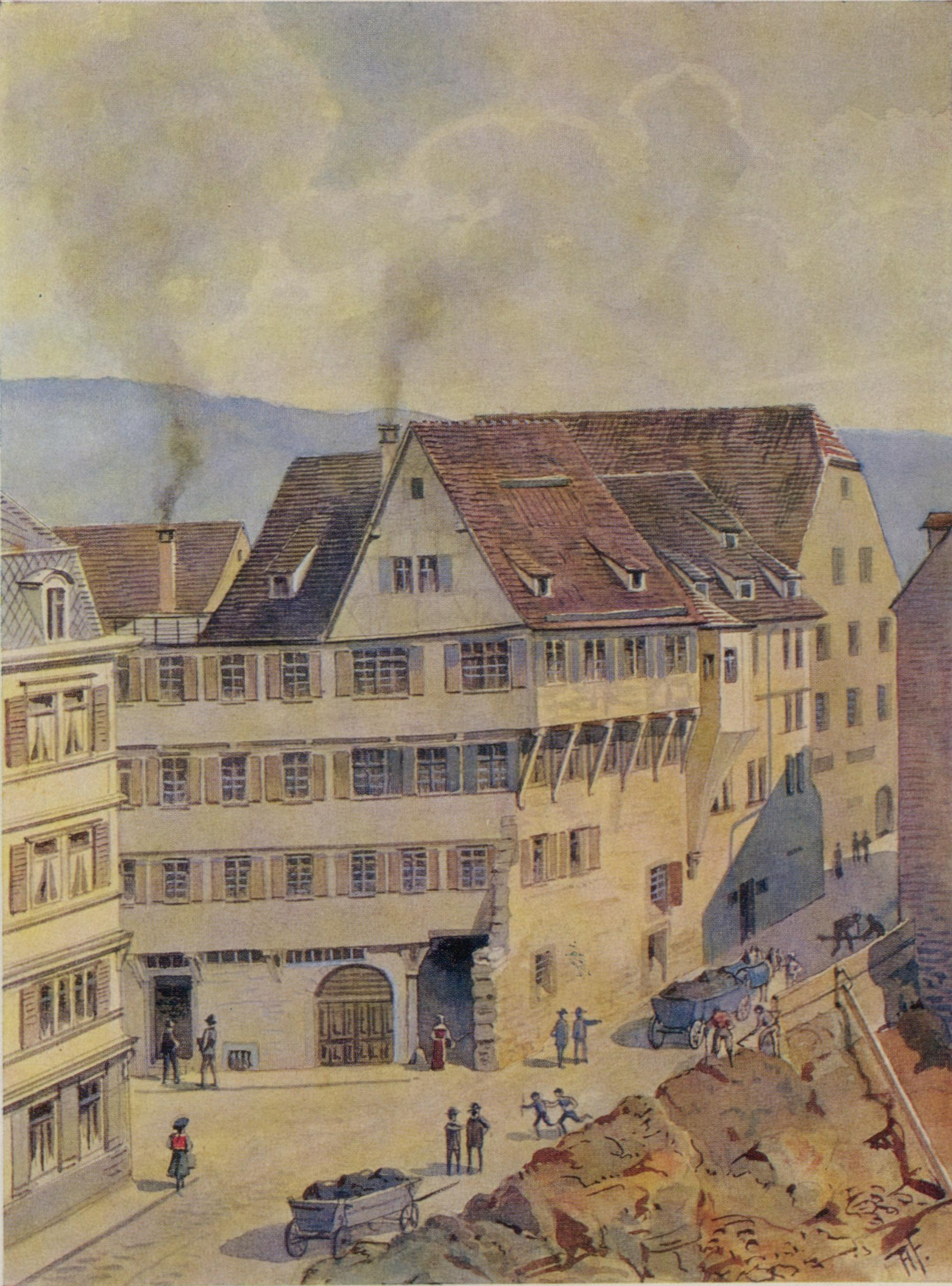 Aquarell „Unter der Mauer“ von August Federer, um 1900. Ehemalige Häuser der Herren von Sachsenheim und Hauptgebäude des einstigen Bebenhäuser Klosterhofs in Stuttgart. – An der Einmündung der Turmstraße (vorn links) in die Schmale Straße steht das Haus des Minnesängers Hermann von Sachsenheim (1440, Turmstraße 7). Dahinter (beginnend bei dem Erker) folgt das Haus seiner beiden Söhne Jörg und Hermann, das wie das Haus ihres Vaters auf den Resten der Stadtmauer erbaut wurde (1478, Schmale Straße 3). Die beiden durch einen Tordurchgang miteinander verbundenen Häuser hießen deshalb „Unter der Mauer“. Das hintere, giebelständige Gebäude mit Krüppelwalmdach war das Hauptgebäude des einstigen Bebenhäuser Klosterhofs. Die 3 Gebäude wurden im Zweiten Weltkrieg zerstört.